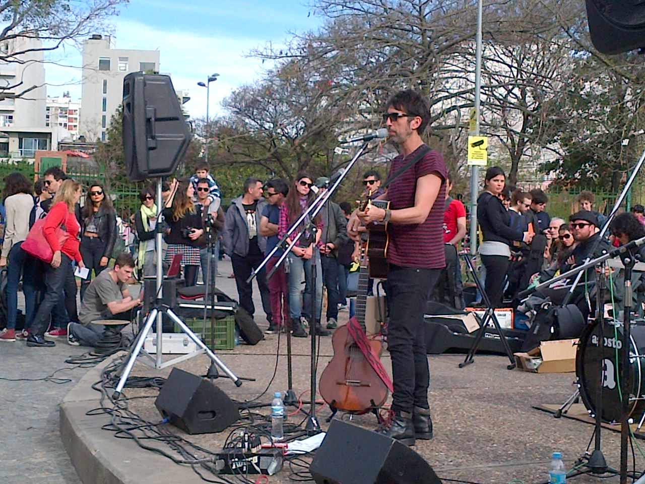 Diego Frenkel en 2014